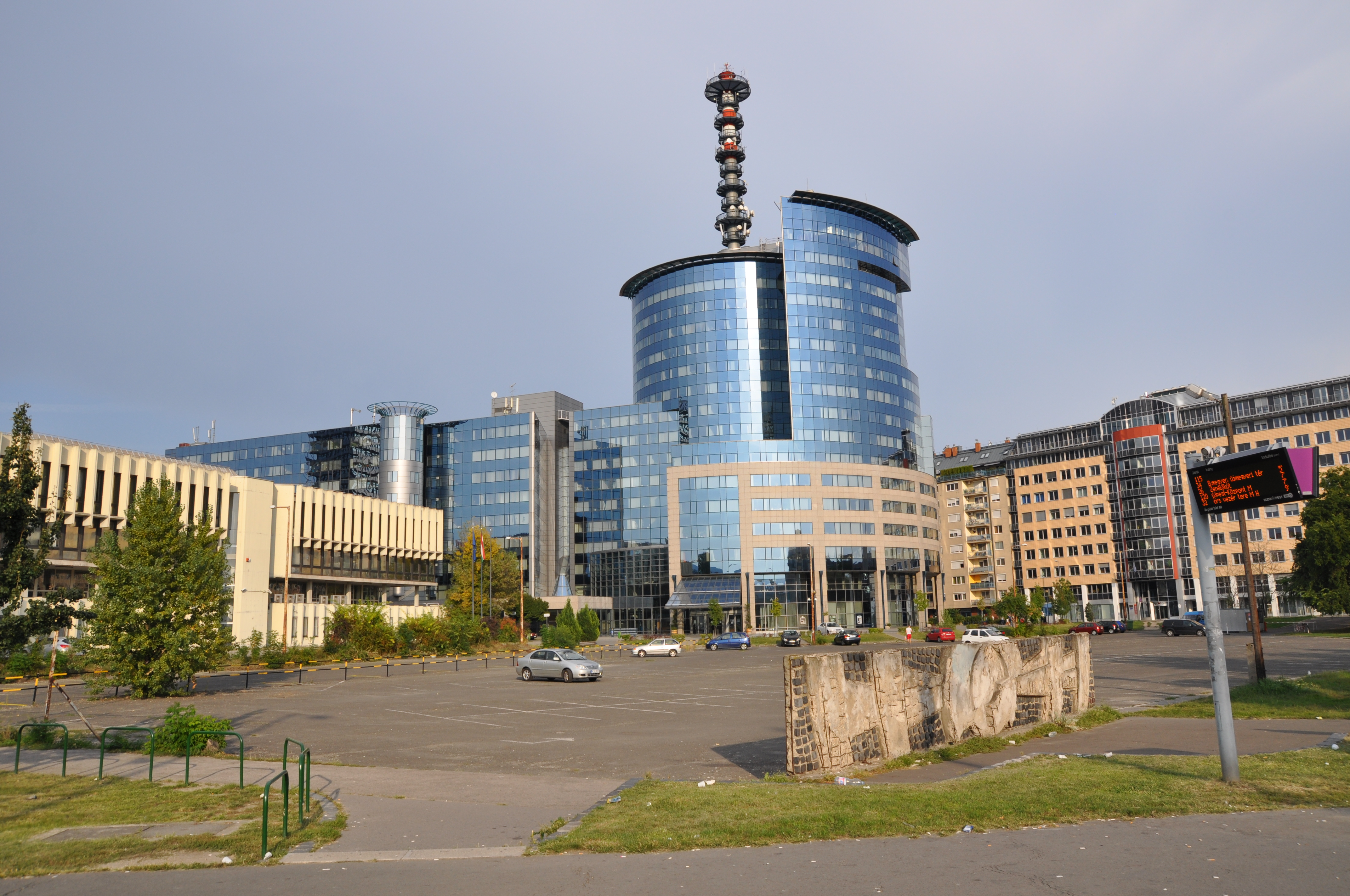 Budapest, Rendőrpalota